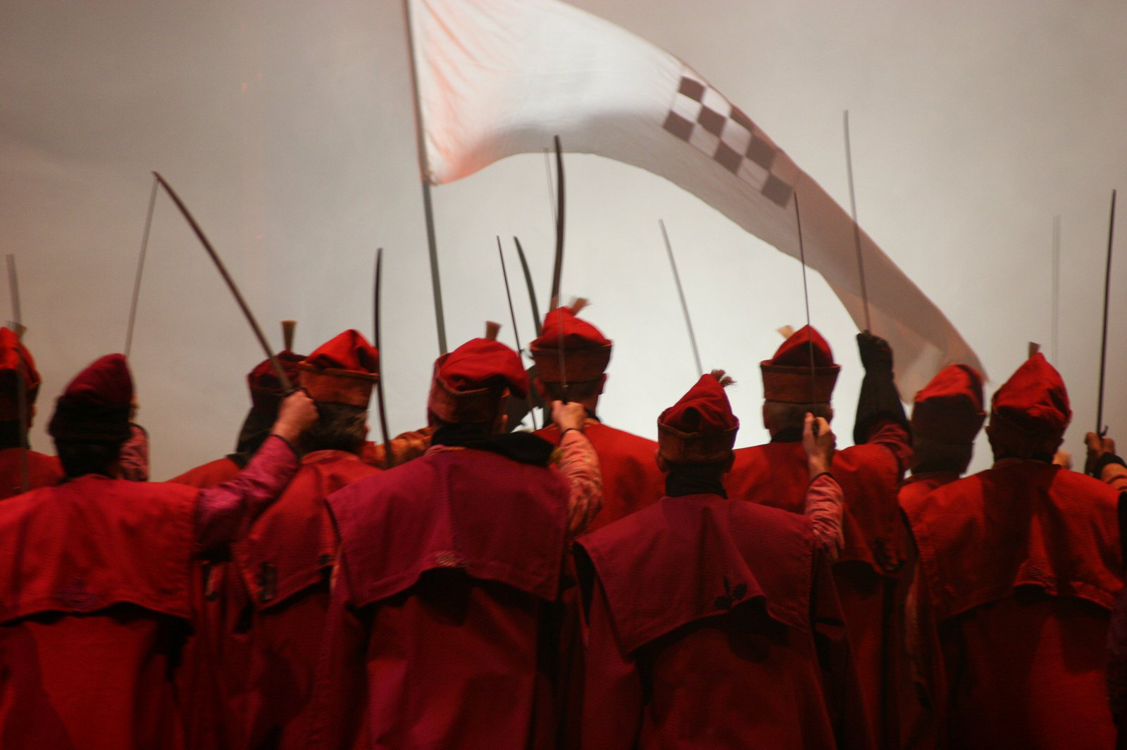 Ivan Zajc, opera Nikola Šubić Zrinski, završna scena. Izvodi Muški zbor HNK Ivan pl. Zajc Rijeka